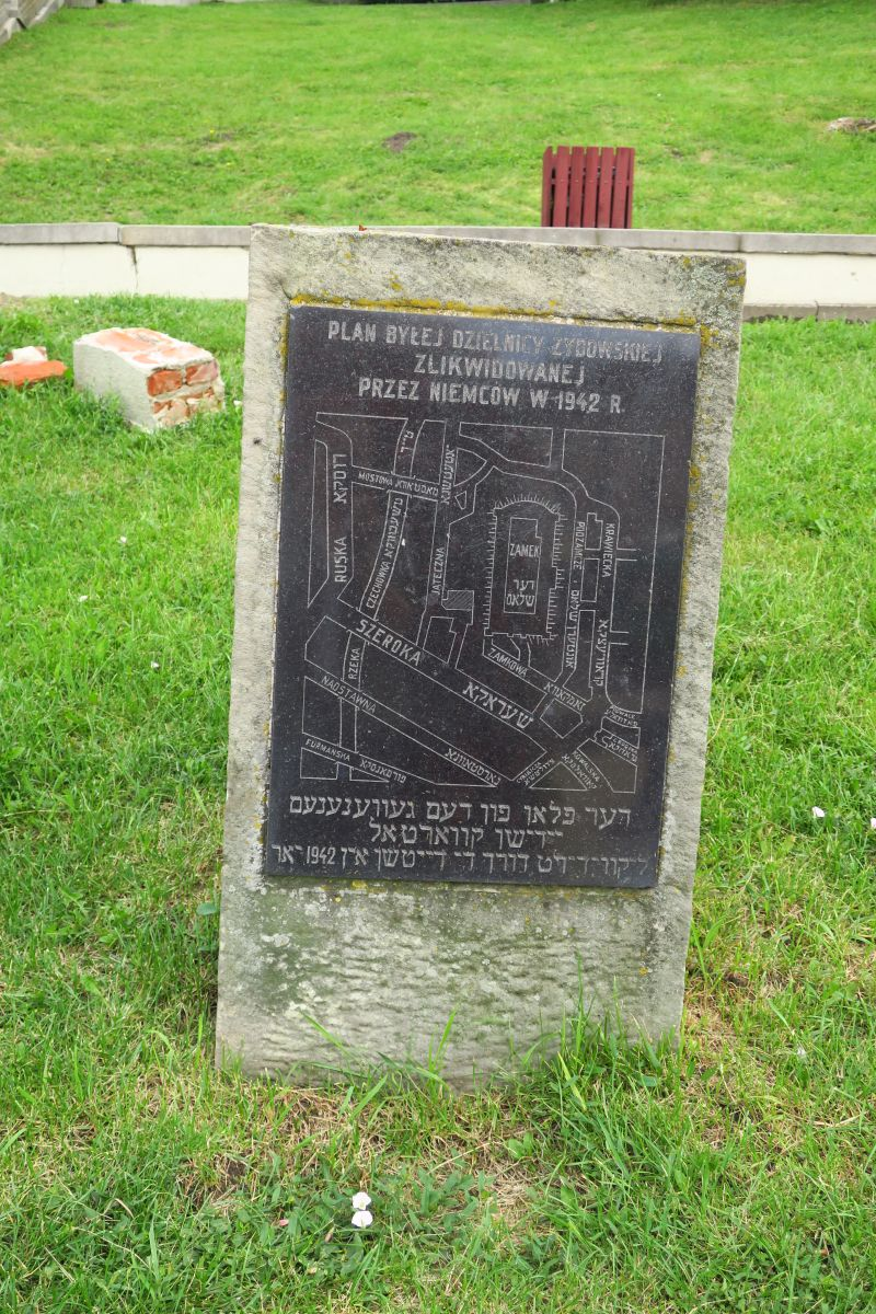 Obelisk przy placu Zamkowym w Lublinie z tablicą upamiętniającą nieistniejącą dzielnicę żydowską.